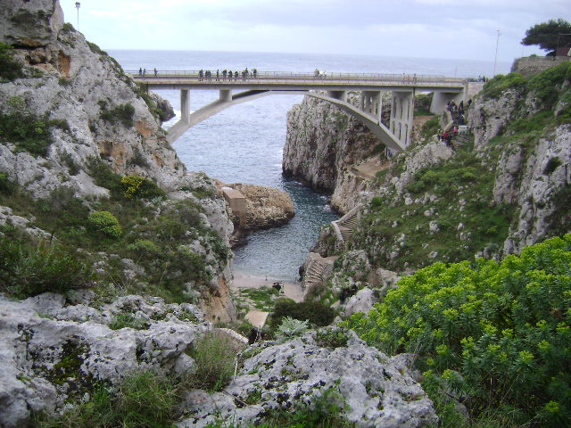 Località Ciolo, Gagliano del Capo